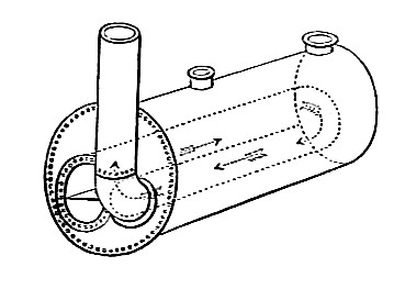 Return flue boiler